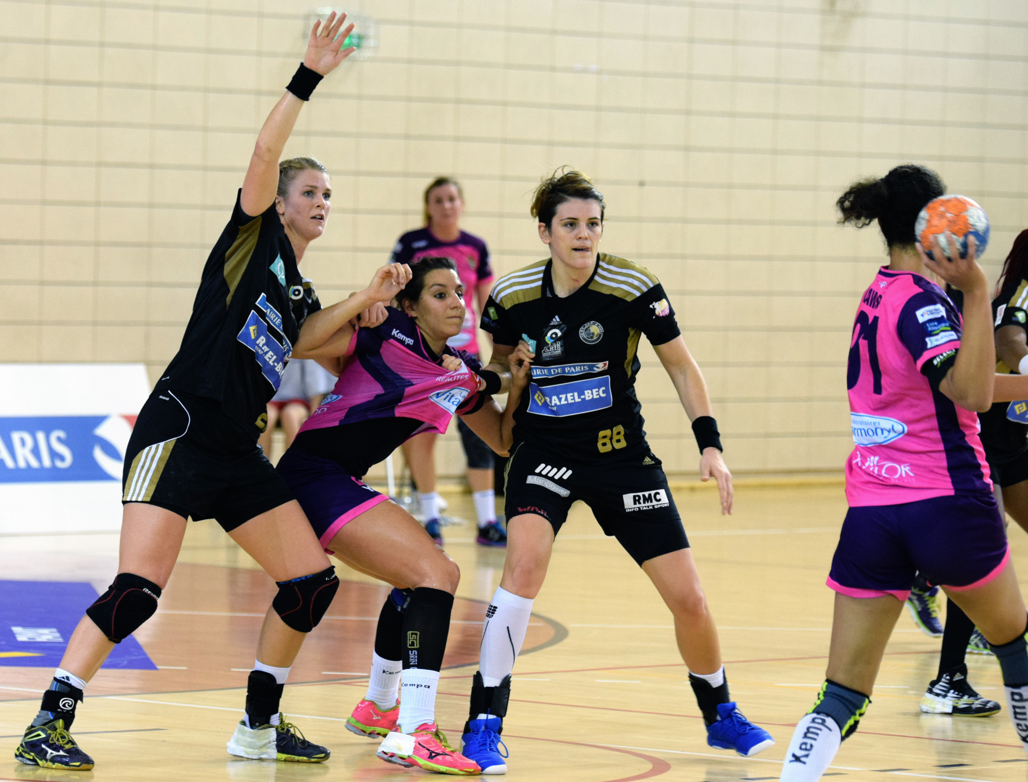 Priscilla Marchal Le 06 novembre 2015, lors du match Issy Paris Hand / Nantes LAHB comptant pour la 11e journée de LFH. Au stade Robert Carpentier à Issy-les-moulineaux.